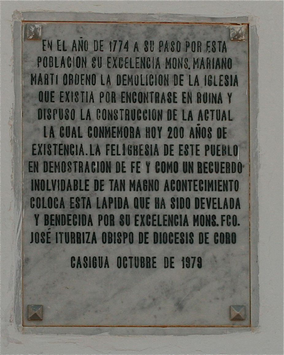 Casigua, estado Falcón. Placa conmemorativa de los 200 años de la iglesia.